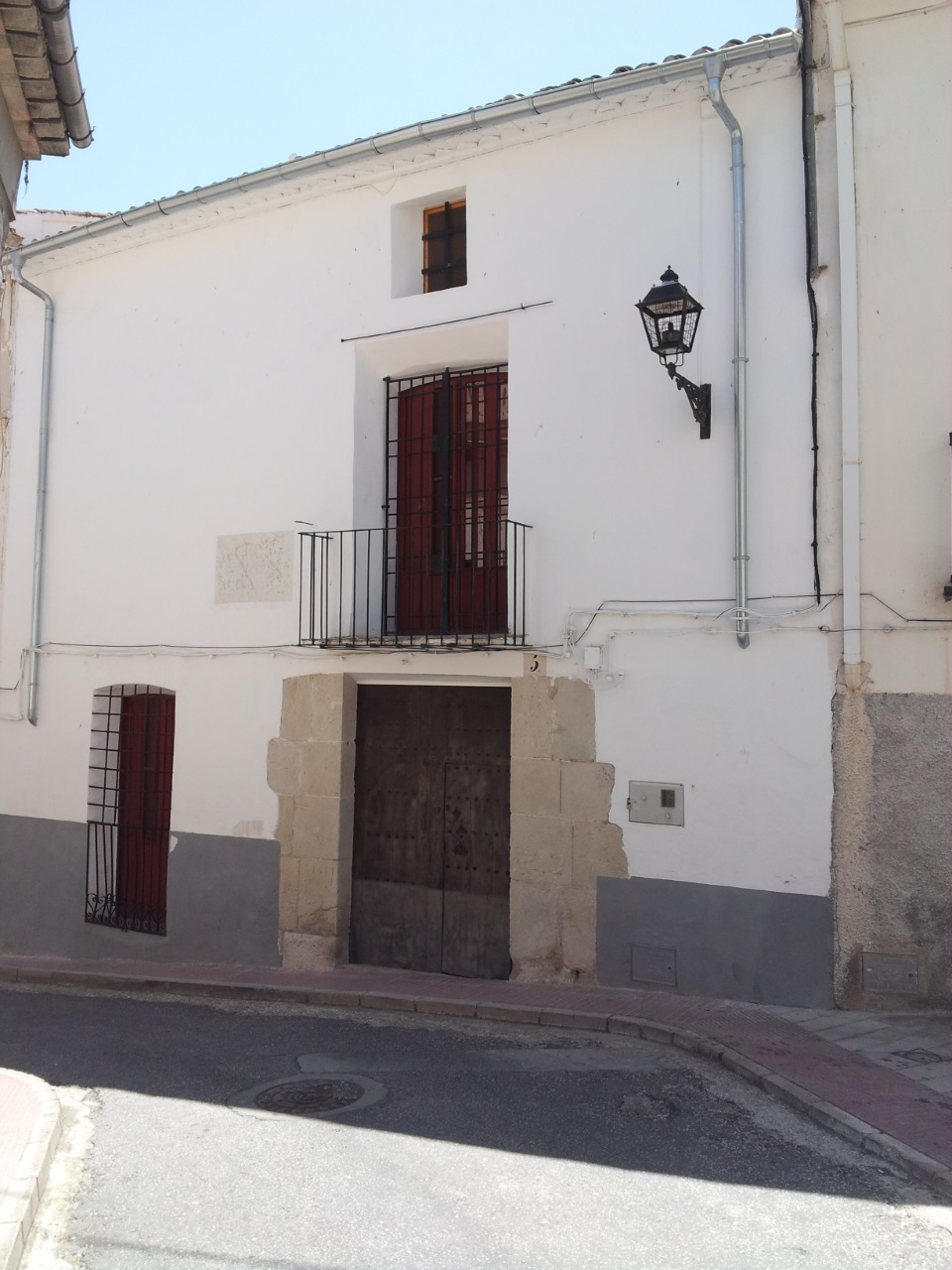 Fachada de la casa natal en Benilloba de Pascual Doménech Tomás (1842-1925), abogado y hombre político valenciano.